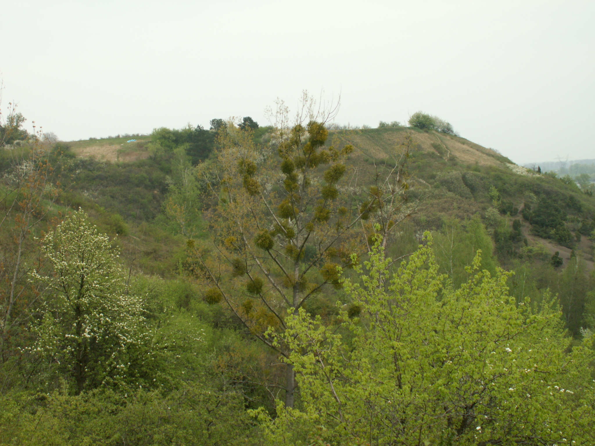 Viscum album Góry Pieprzowe + jemioła w Sandomierzu